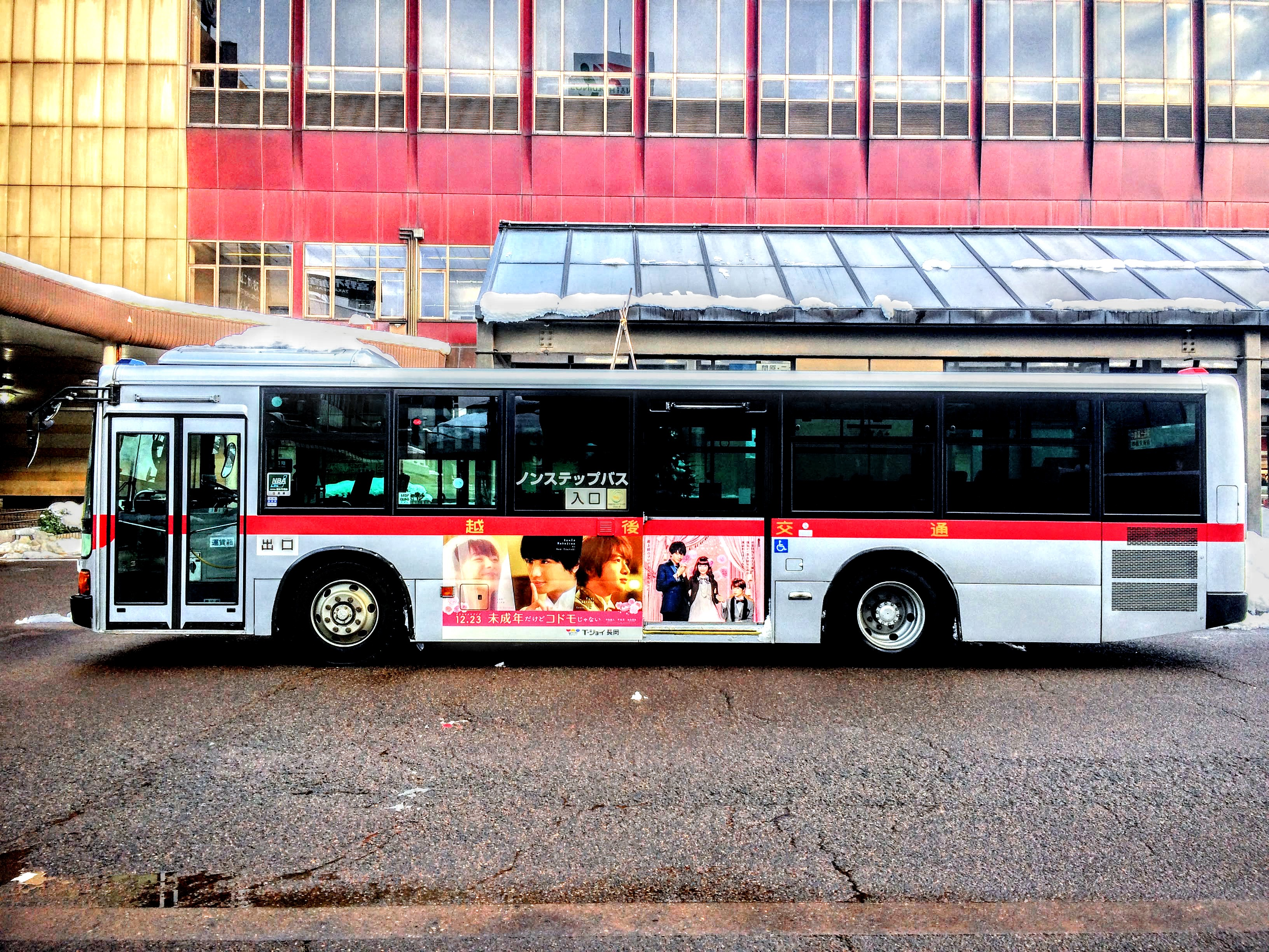 越後交通・ふそうエアロスター・未成年だけど子供じゃない